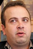 ديدار علی شفیعی زاده، مدير عامل وقت باشگاه استقلال اهواز ازخبرگزاری مهر